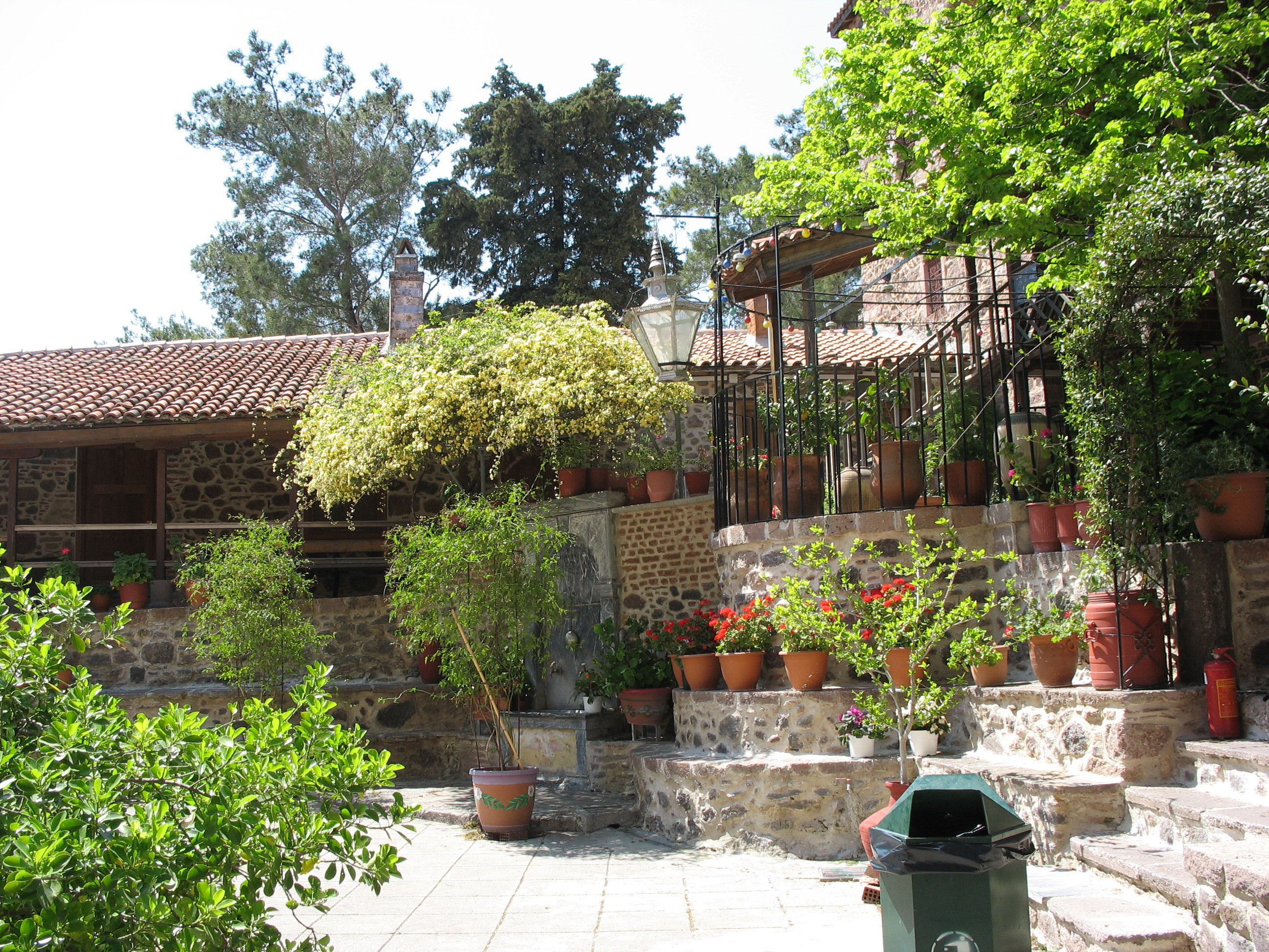 Auli tis ekklisias ton taksiarhon sto Mantamado